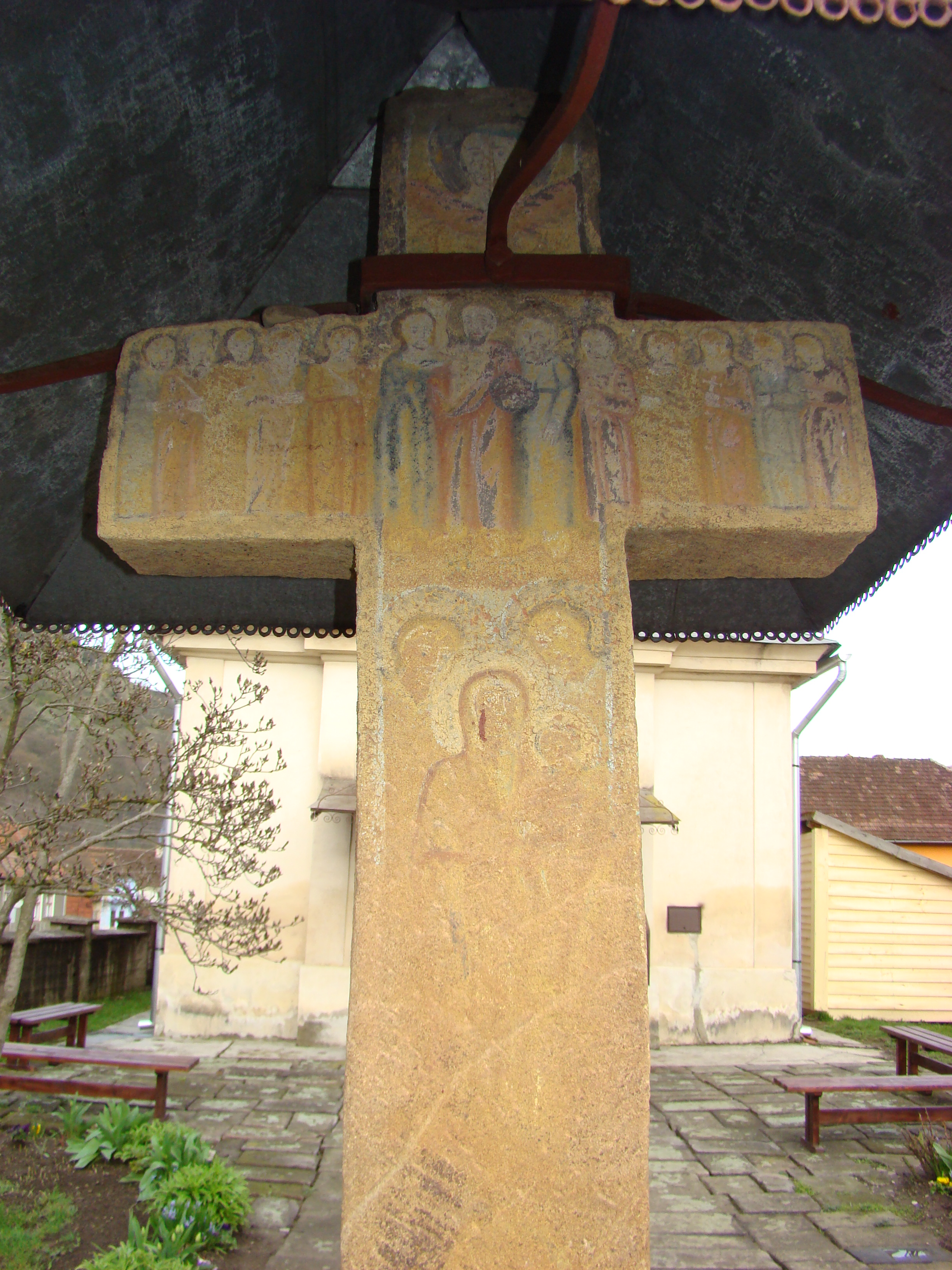 Troiță 02